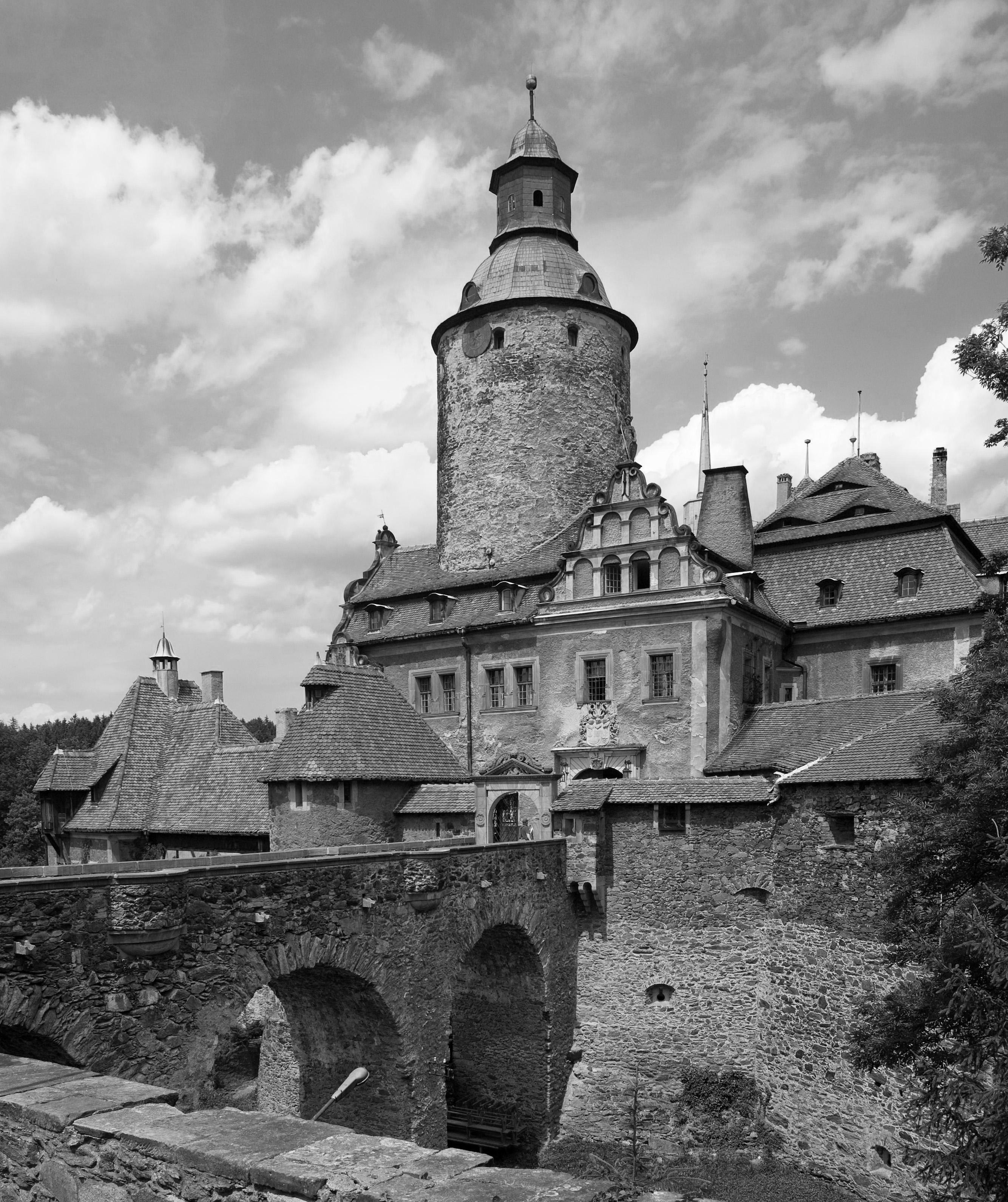 Zamek Czocha, Górne Łużyce, Polska.